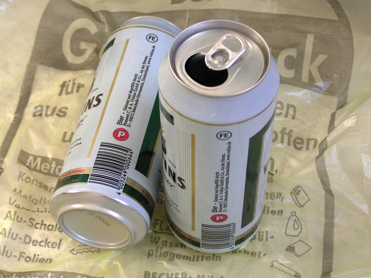 Getränkedosen aus Weißblech, 2005-01-16 *Fotograf: Benutzer:Hafenbar